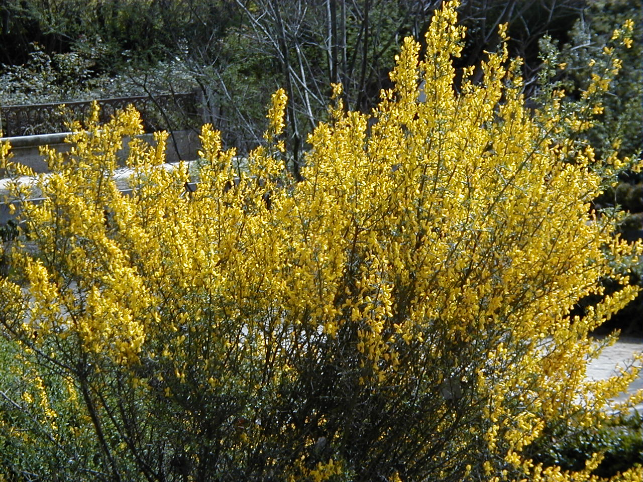 Genista scorpius. Real Jardín Botánico, Madrid